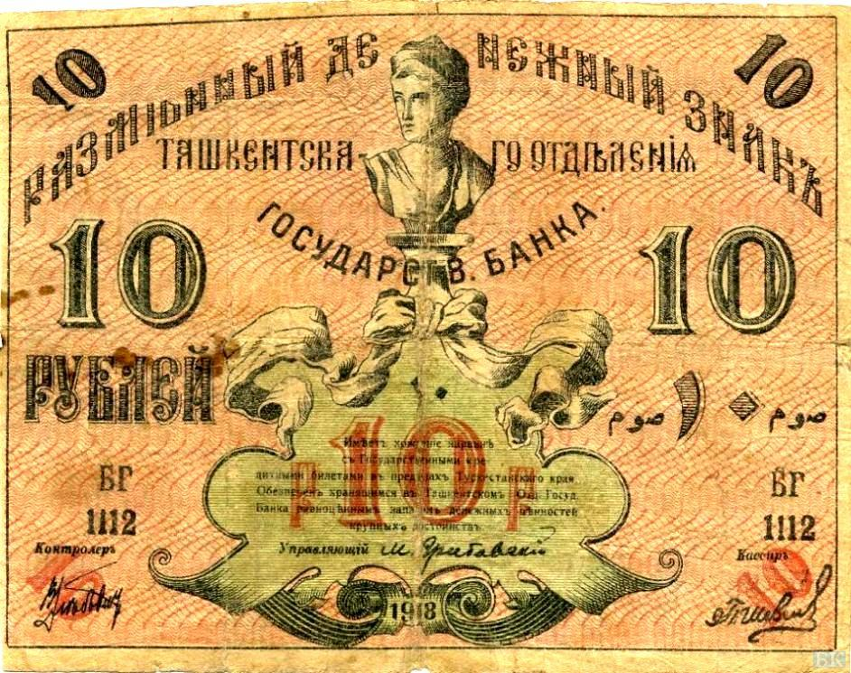 Неразменный денежный знак 10 рублей 1918 Туркестанского края РСФСР. Ташкент. Аверс.